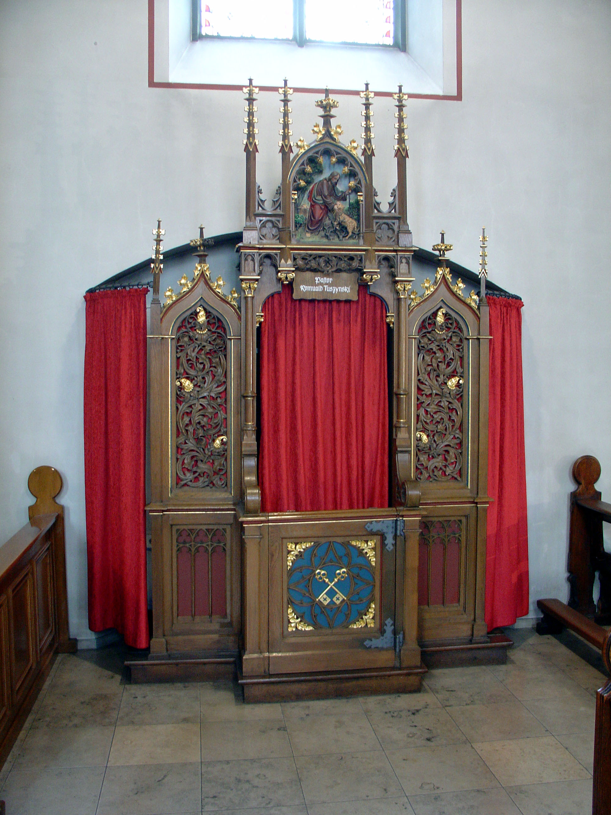 Beichtstuhl in St. Joseph in Delbrück-Westenholz